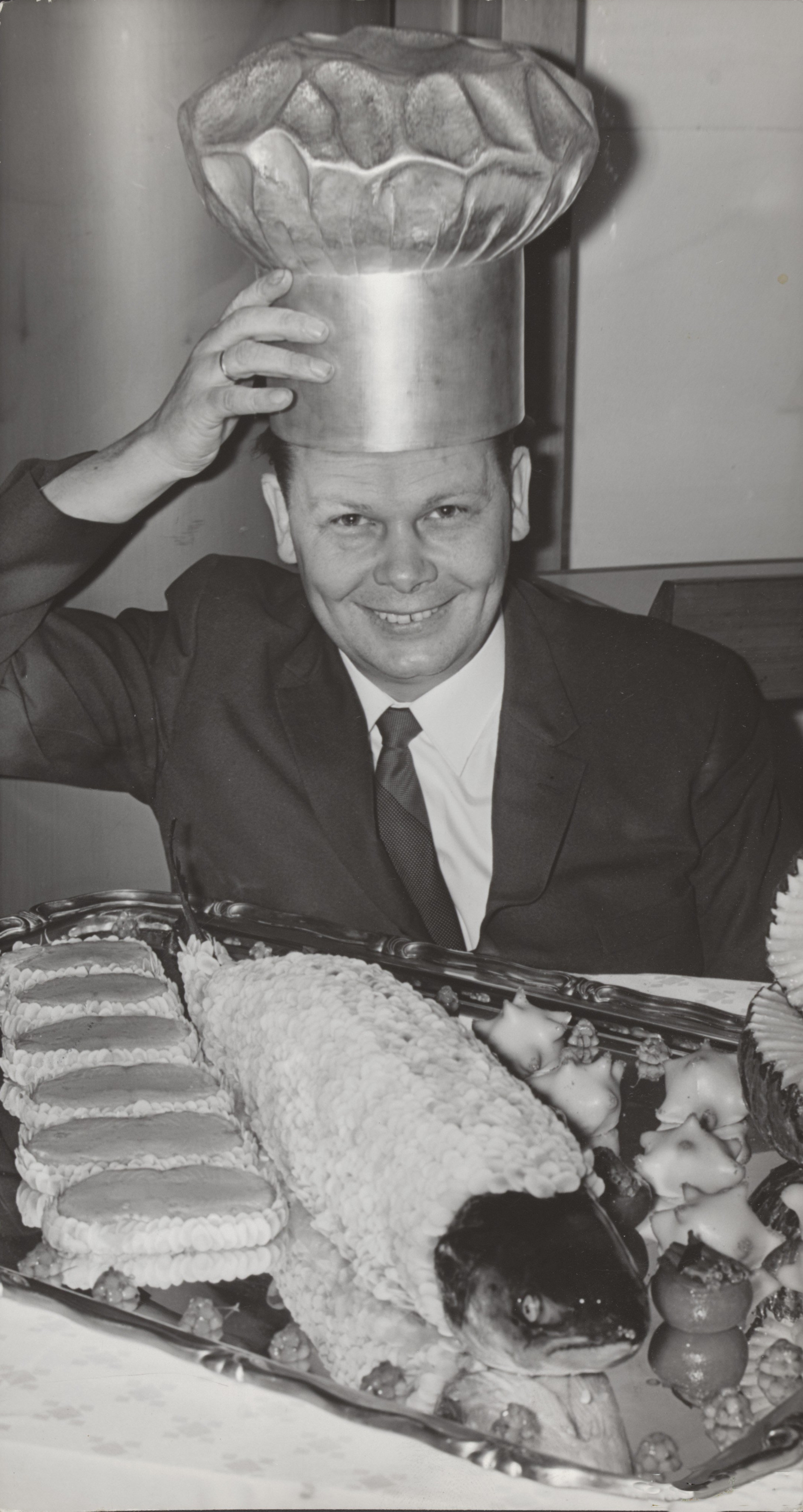 Collectie / Archief : Fotocollectie Elsevier Reportage / Serie : [ onbekend ] Beschrijving : Op de laatste dag van de Horecava in de Amsterdamse RAI vond een wedstrijd plaats waaruit moet blijken wie de beste kok van ons land is. De onderscheiding, een zilveren koksmuts, ging naar C.W. van Dusschoten, chef de partie van de KLM Schiphol. Bij zijn werkstuk een met 2500 noten versierde zalm (16 werkuren....) Datum : 6 januari 1966 Locatie : Amsterdam, Noord-Holland Trefwoorden : kokmutsen, koks, onderscheidingen Persoonsnaam : Dusschoten, C.W. van Instellingsnaam : RAI Fotograaf : Koch, Eric / Anefo Auteursrechthebbende : Nationaal Archief Materiaalsoort : Foto (zwart/wit) Nummer archiefinventaris : bekijk toegang 2.24.05.02 Bestanddeelnummer : 093-0552